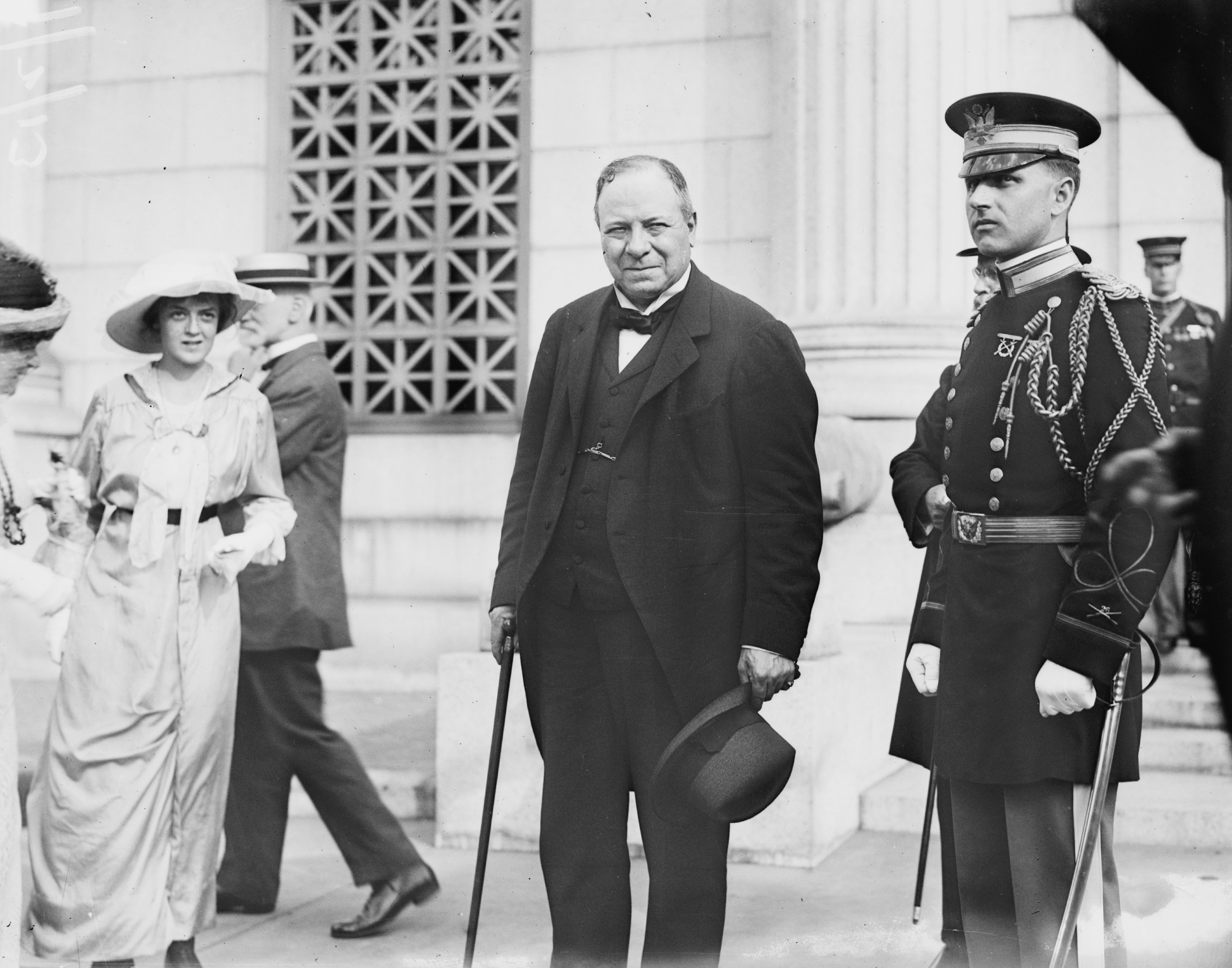 Autore: sconosciuto. Fonte: Biblioteca del Congresso degli Stati Uniti. Il Ministro britannico della Guerra Haldane visita l'Accademia militare di West Point (USA).